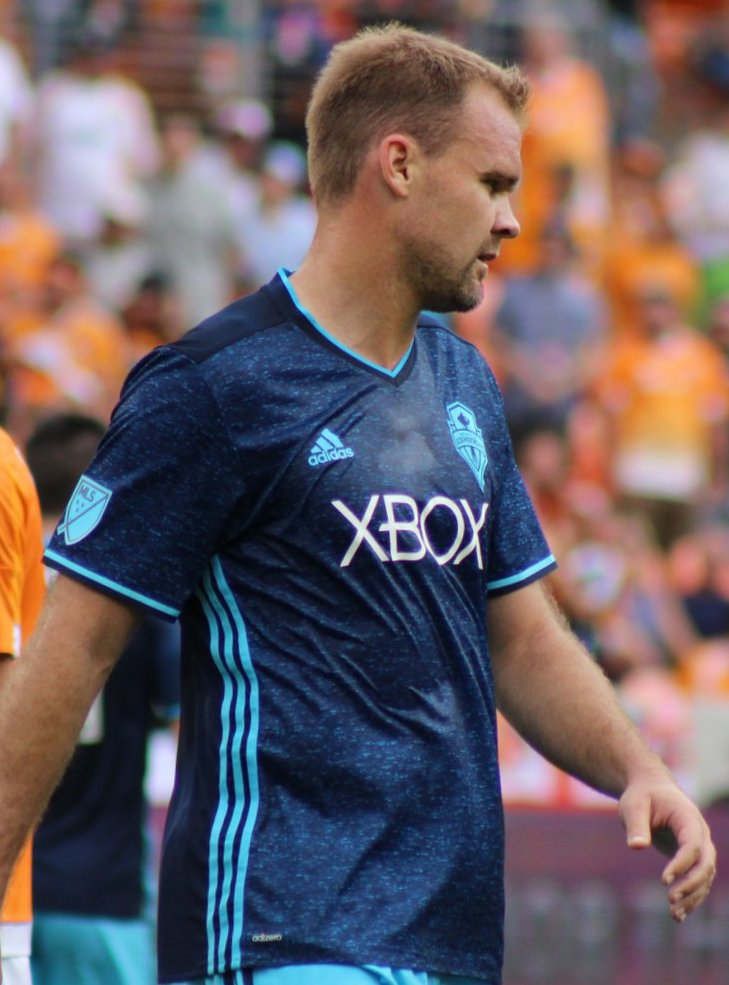 Chad Marshall